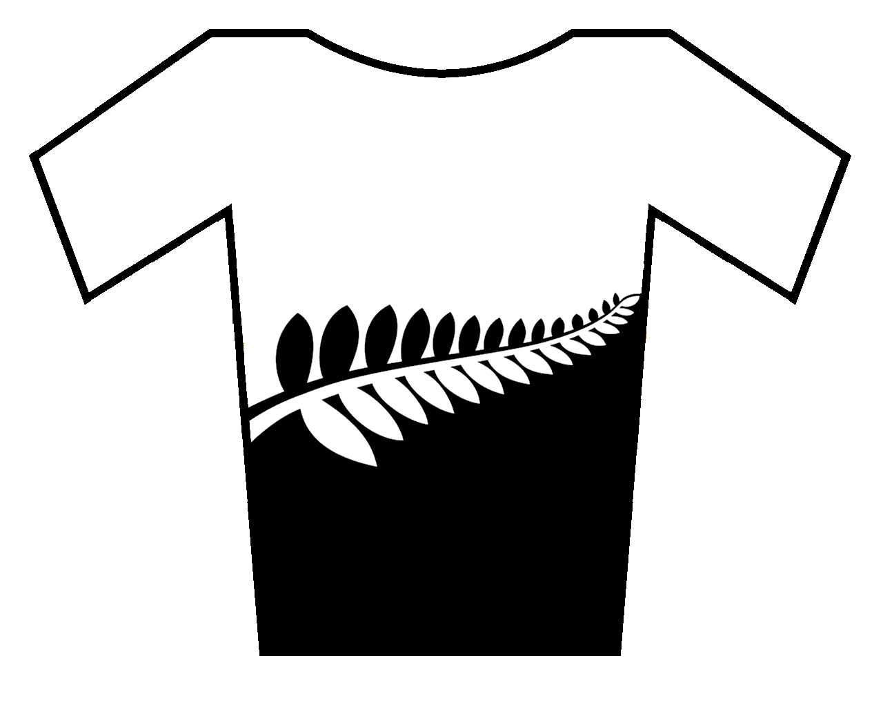 Maillot de Nueva Zelanda